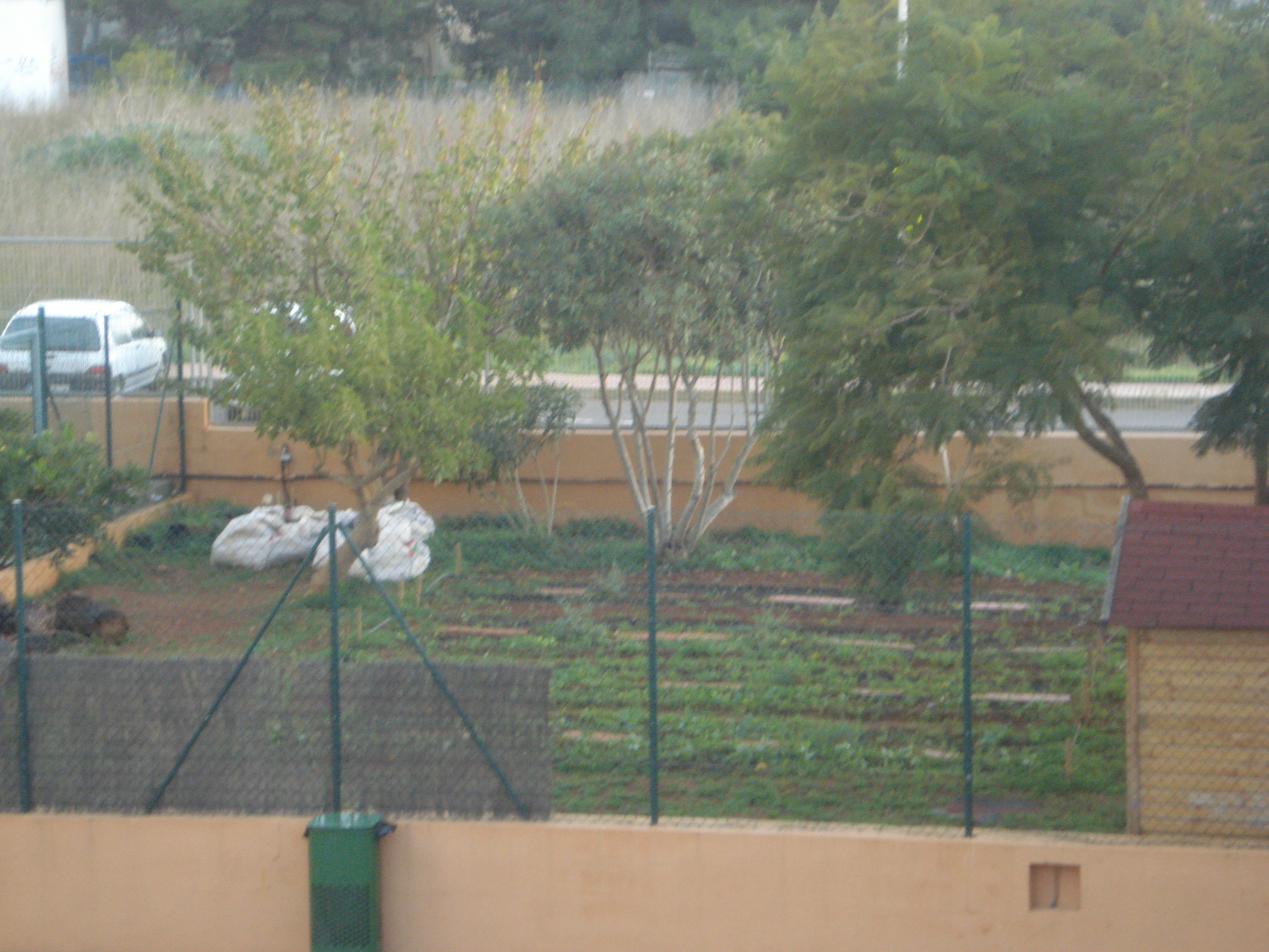 Hort ecològic de l'IES Xarc de Santa Eulària des Riu, Eivissa